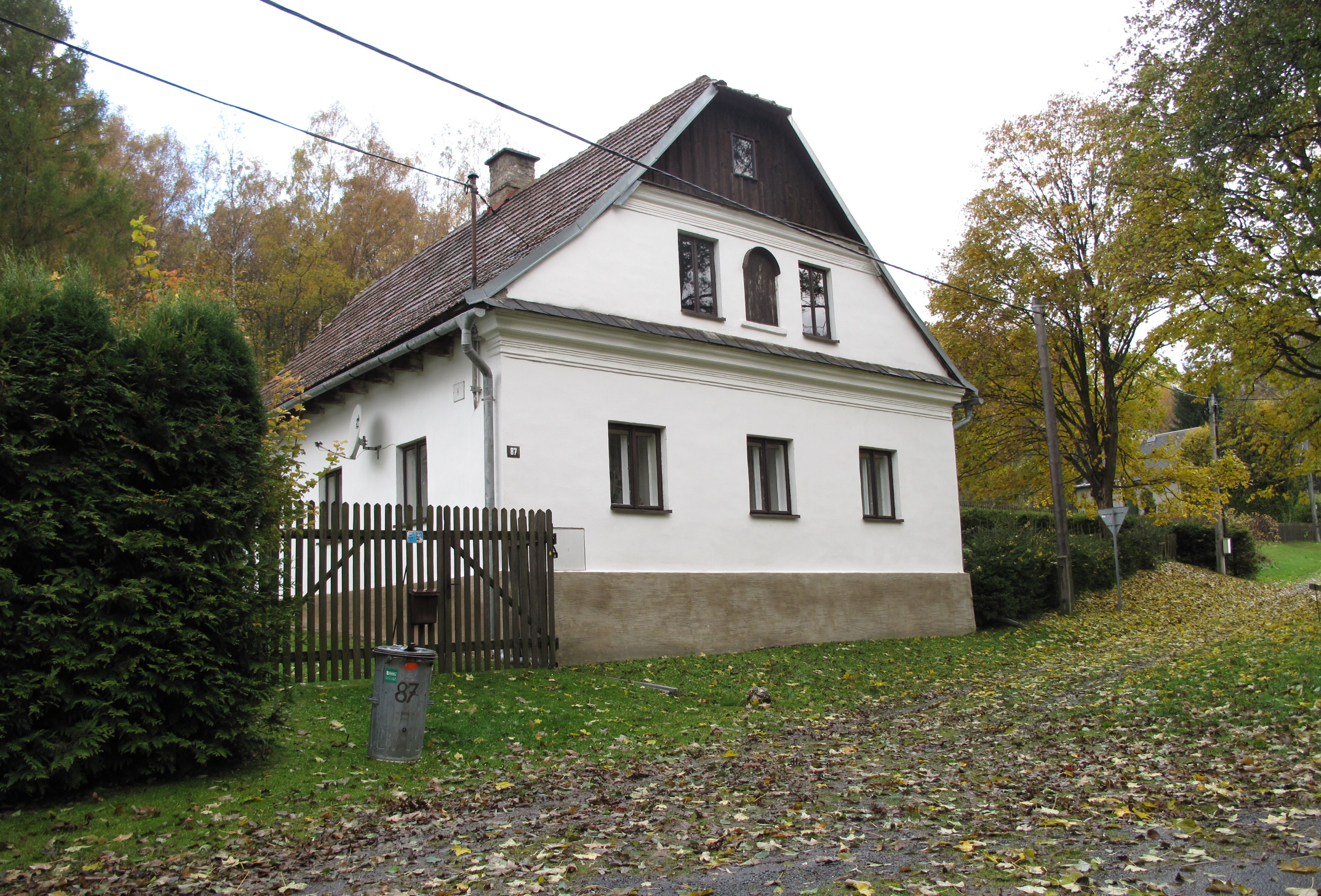 Stará Voda (Světlá Hora). Okres Bruntál, Česká republika.